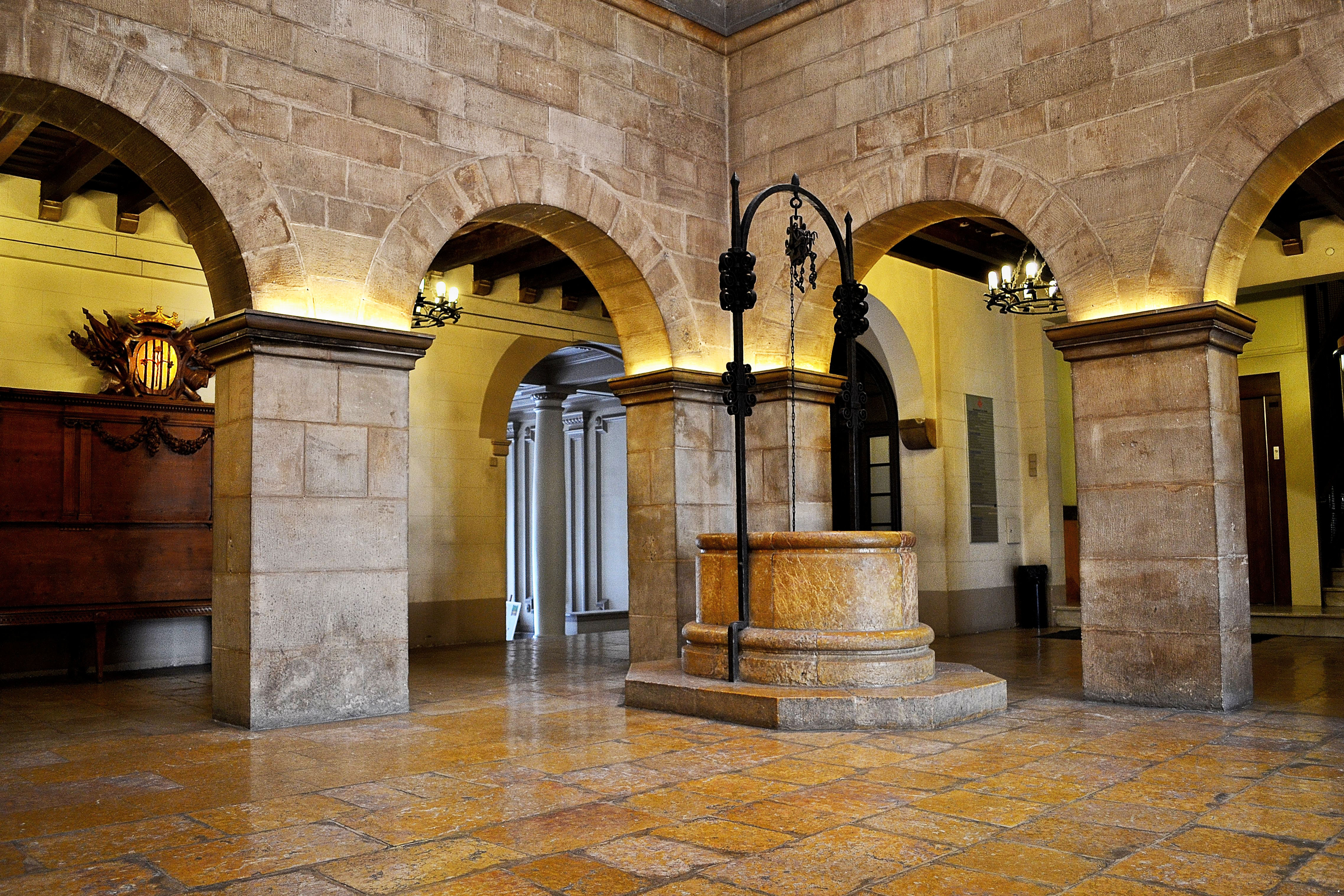 Vestíbulo de la Paeria de Lleida.